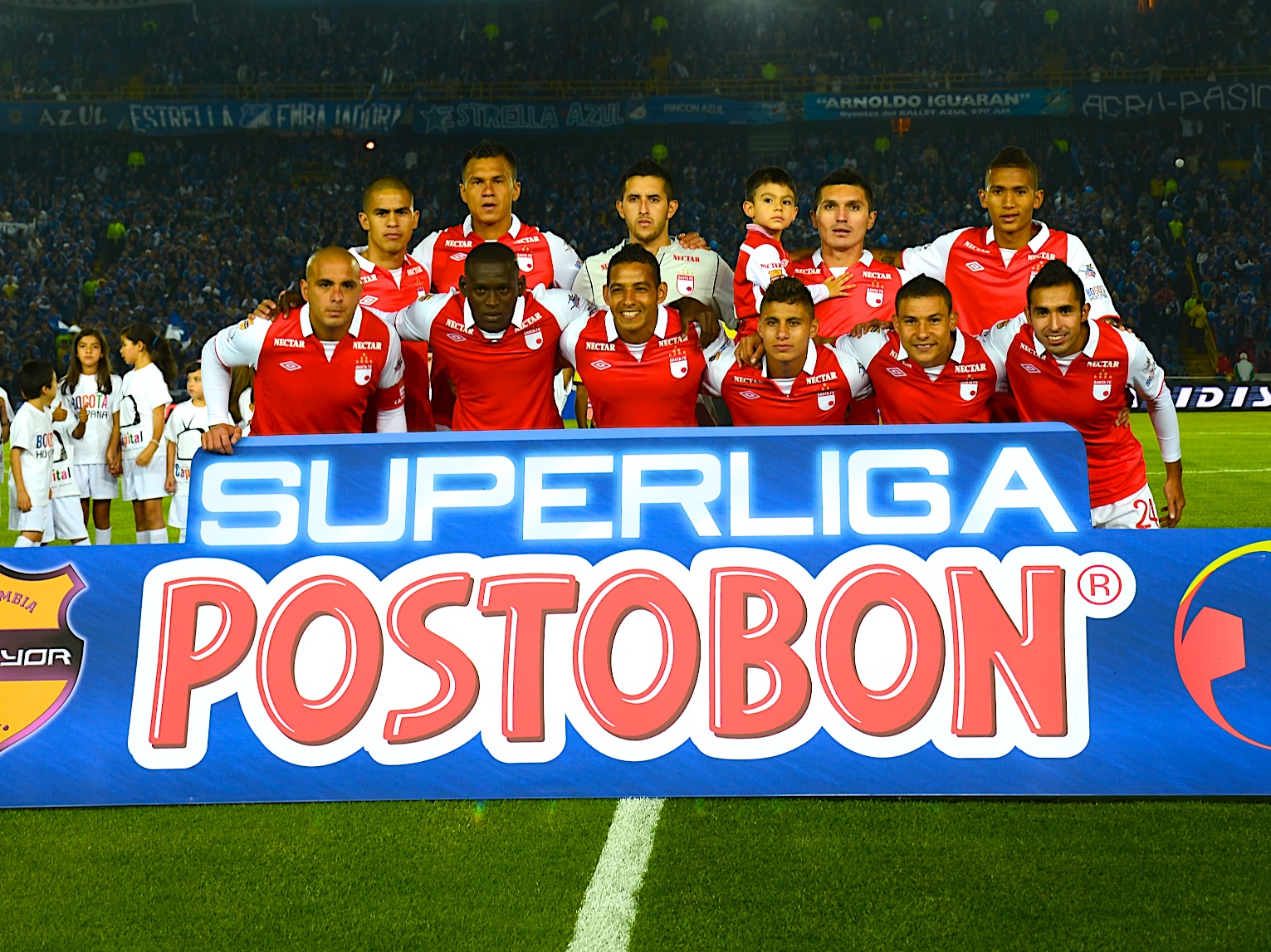 Nómina titular del partido de ida por la Superliga Postobon de Campeones de Colombia, Estadio El Campín, Bogotá Enero 24 de 2013